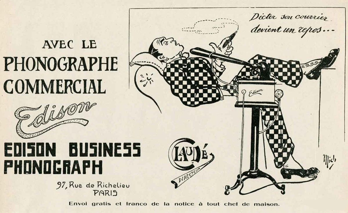 Publicité pour le phonographe commercial Edison Business Phonograph, illustration de Mich, 1911.